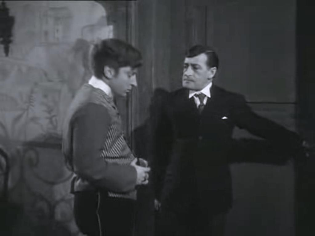 Screenshot dal film 47 morto che parla (1950). Sono ripresi in scena Carlo Croccolo (a sinistra) e Totò (a destra).